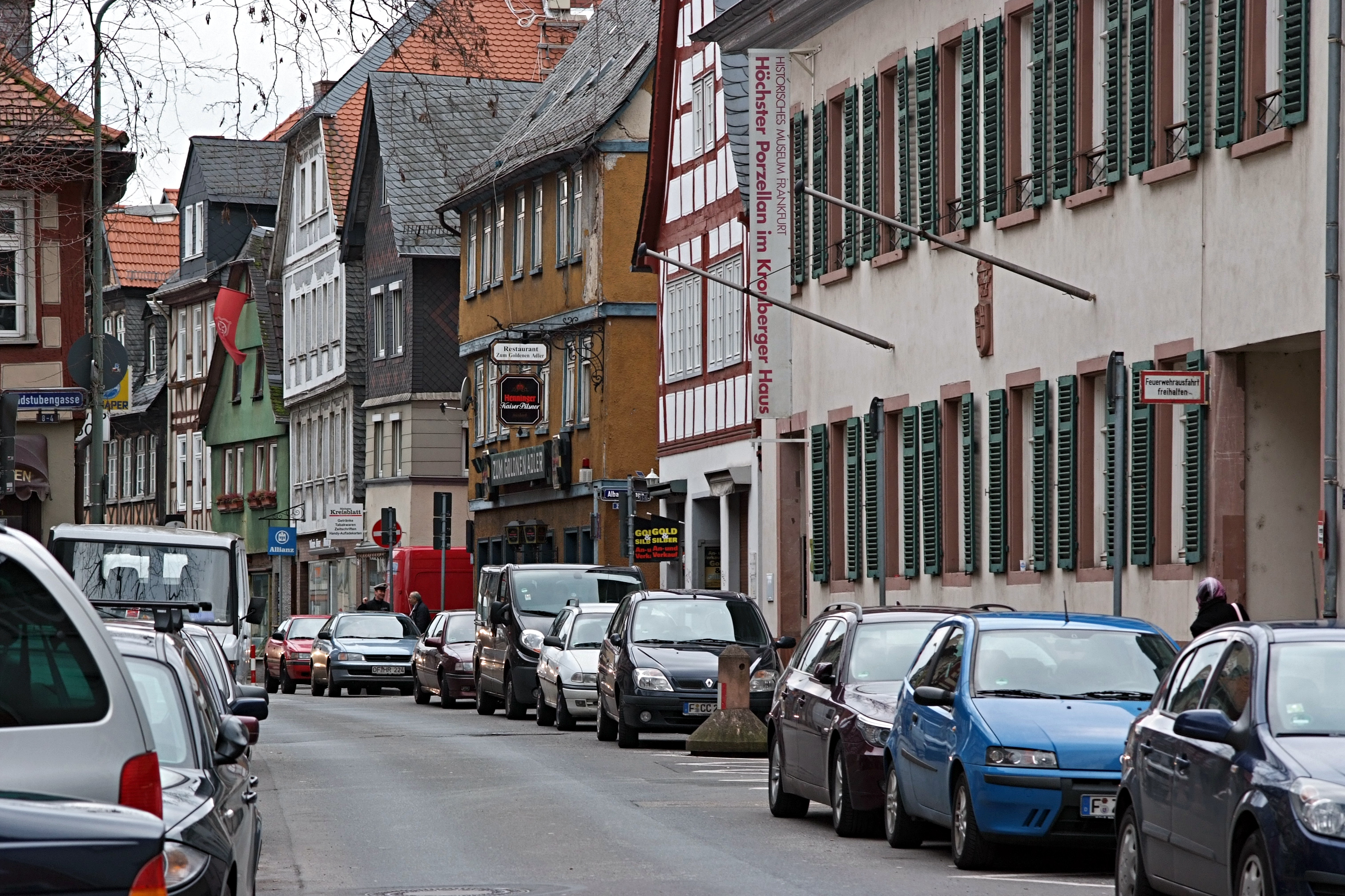 Bolongarostraße von Osten, Februar 2009